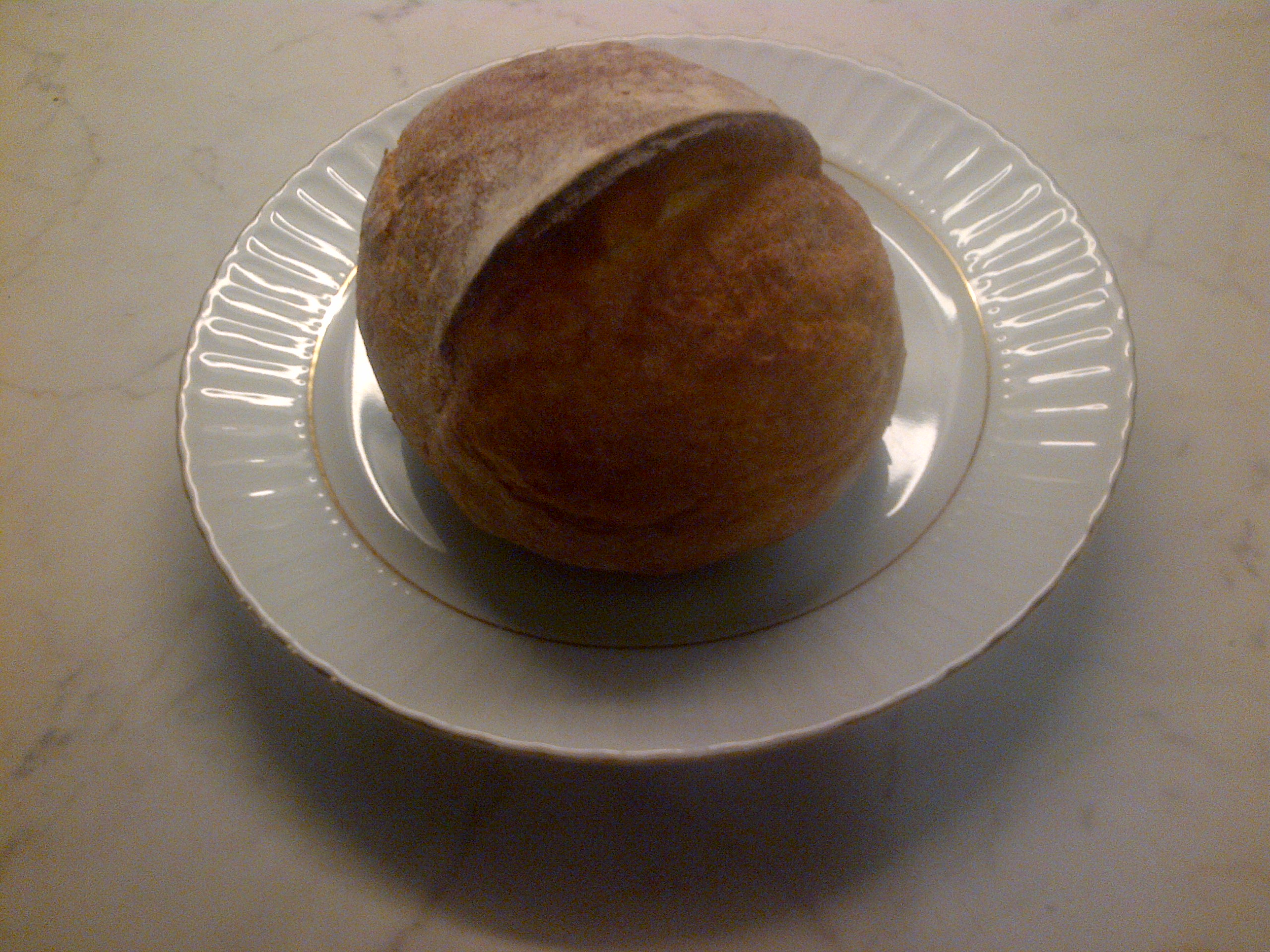 Somun, un pan tradicional y comun en Turquia.